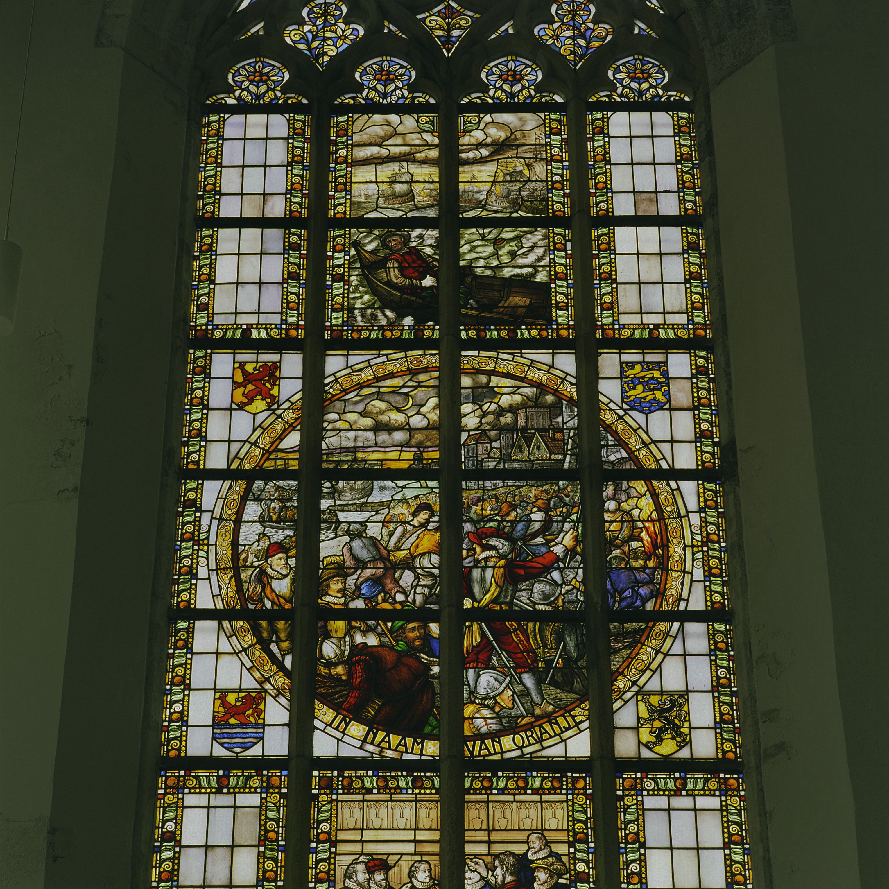 Grote- of Sint Catharijnekerk: Interieur, detail van glas-in-lood raamin de zuiderzijbeuk, westzijde (opmerking: Boek: "66 Kanjermonumenten")